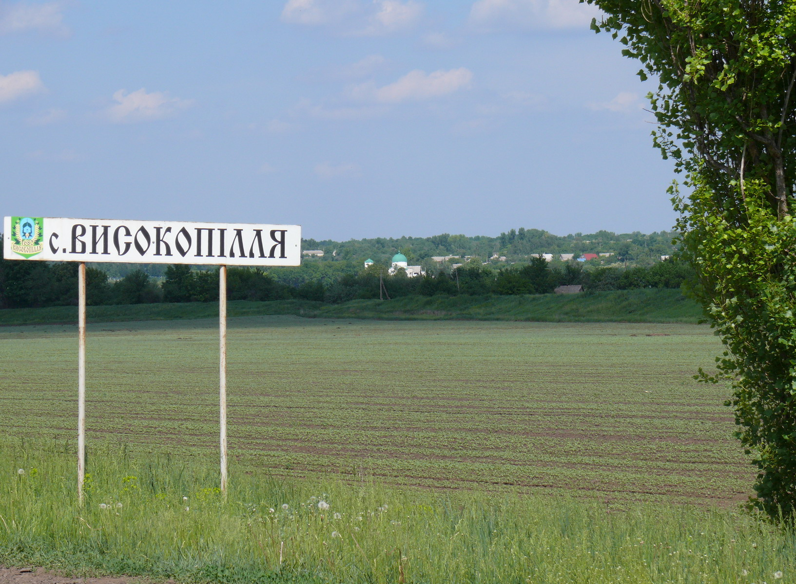 На въезде в село